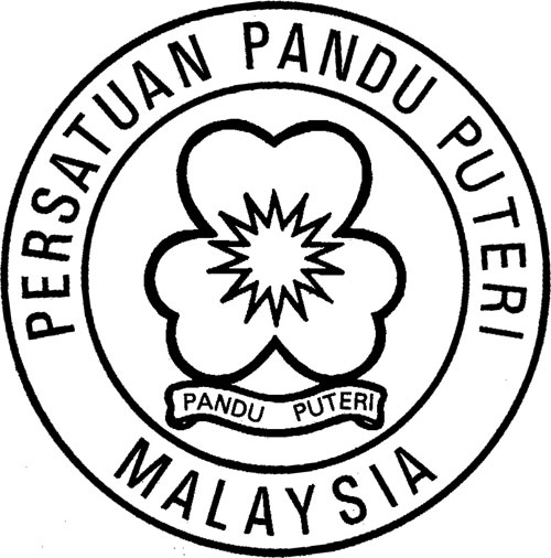 Logo Rasmi Persatuan Pandu Puteri Malaysia